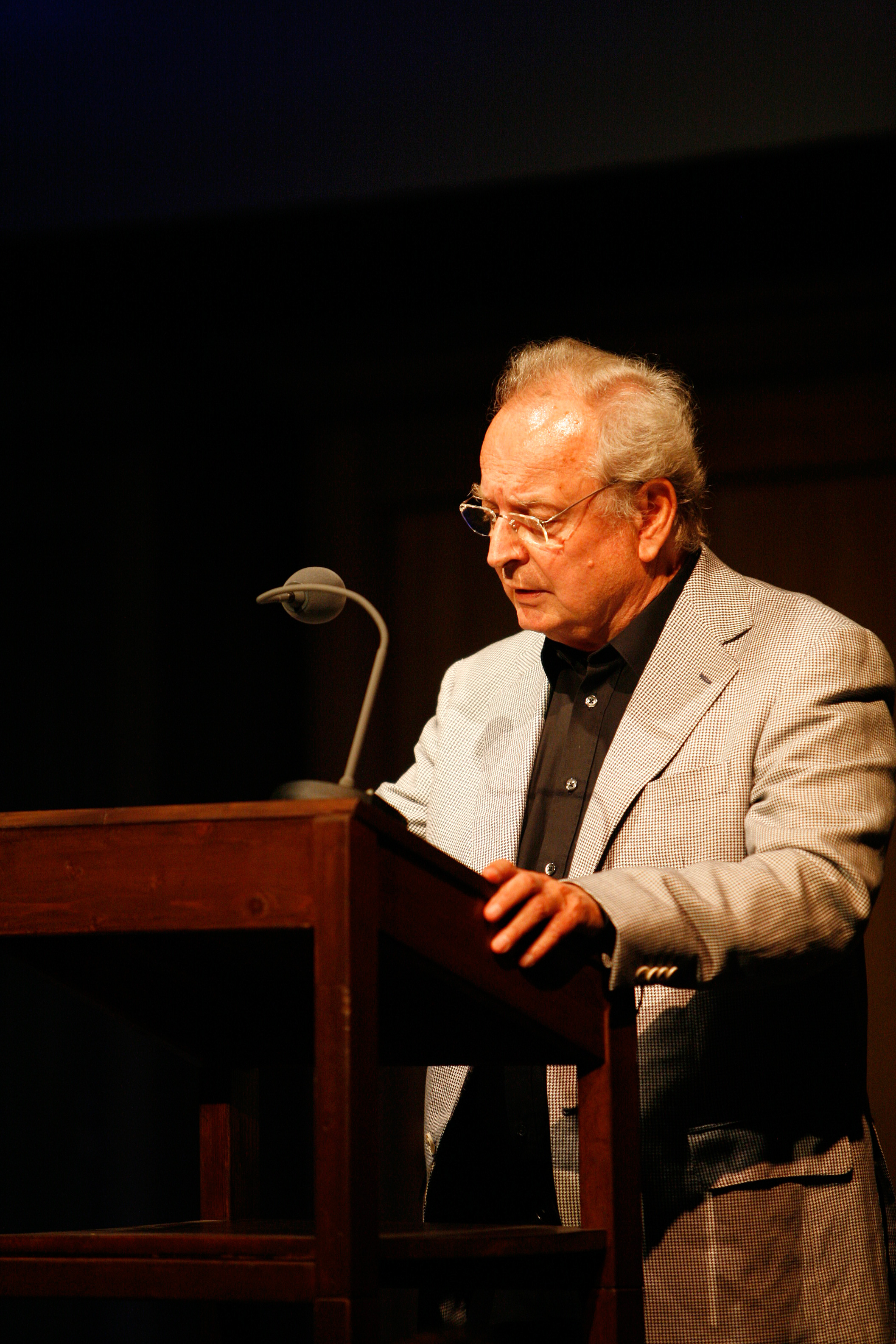 Alfred Wopmann Salzmann